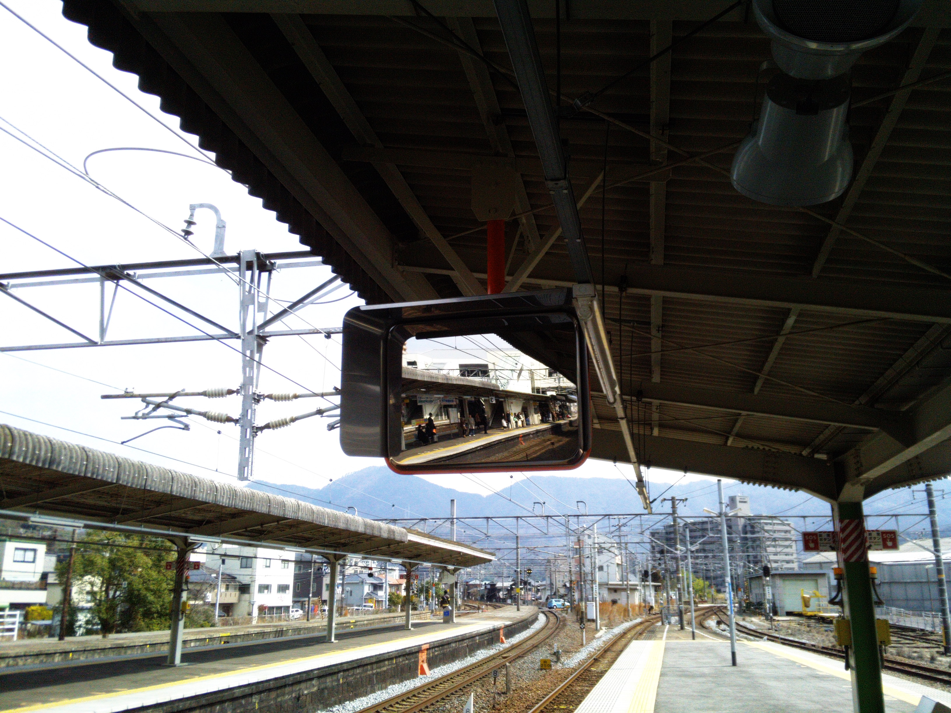 撮影日:2012年3月3日(土) 海田市駅 呉線ホーム(4番乗り場)にて撮影